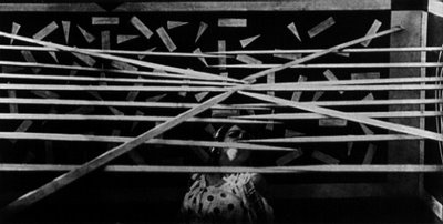 Foto di scena di Thaïs (1917) - regia di Anton Giulio Bragaglia e Riccardo Cassano - produz "Novissima Film" Roma)